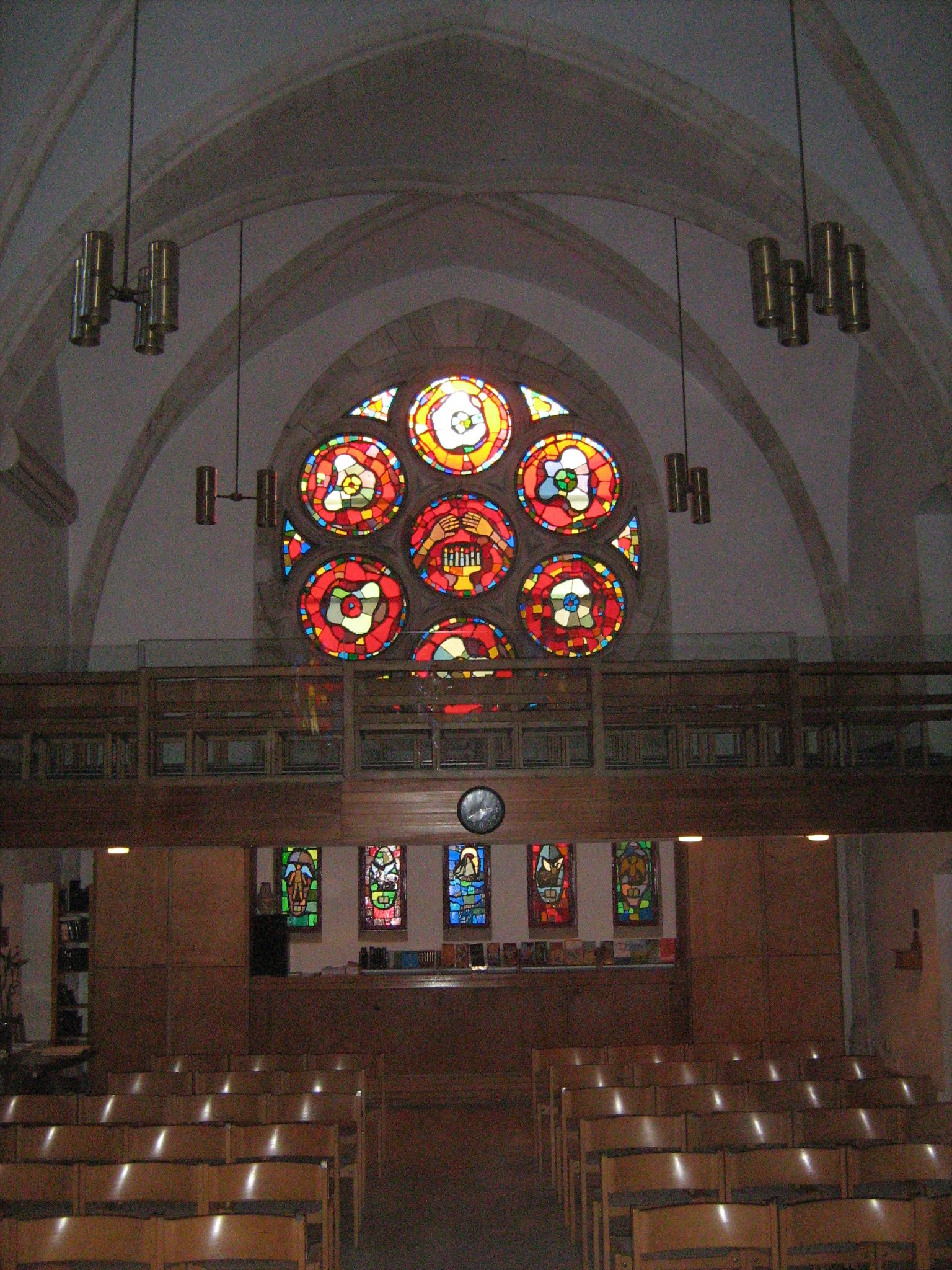 המושבה האמריקאית ביפו